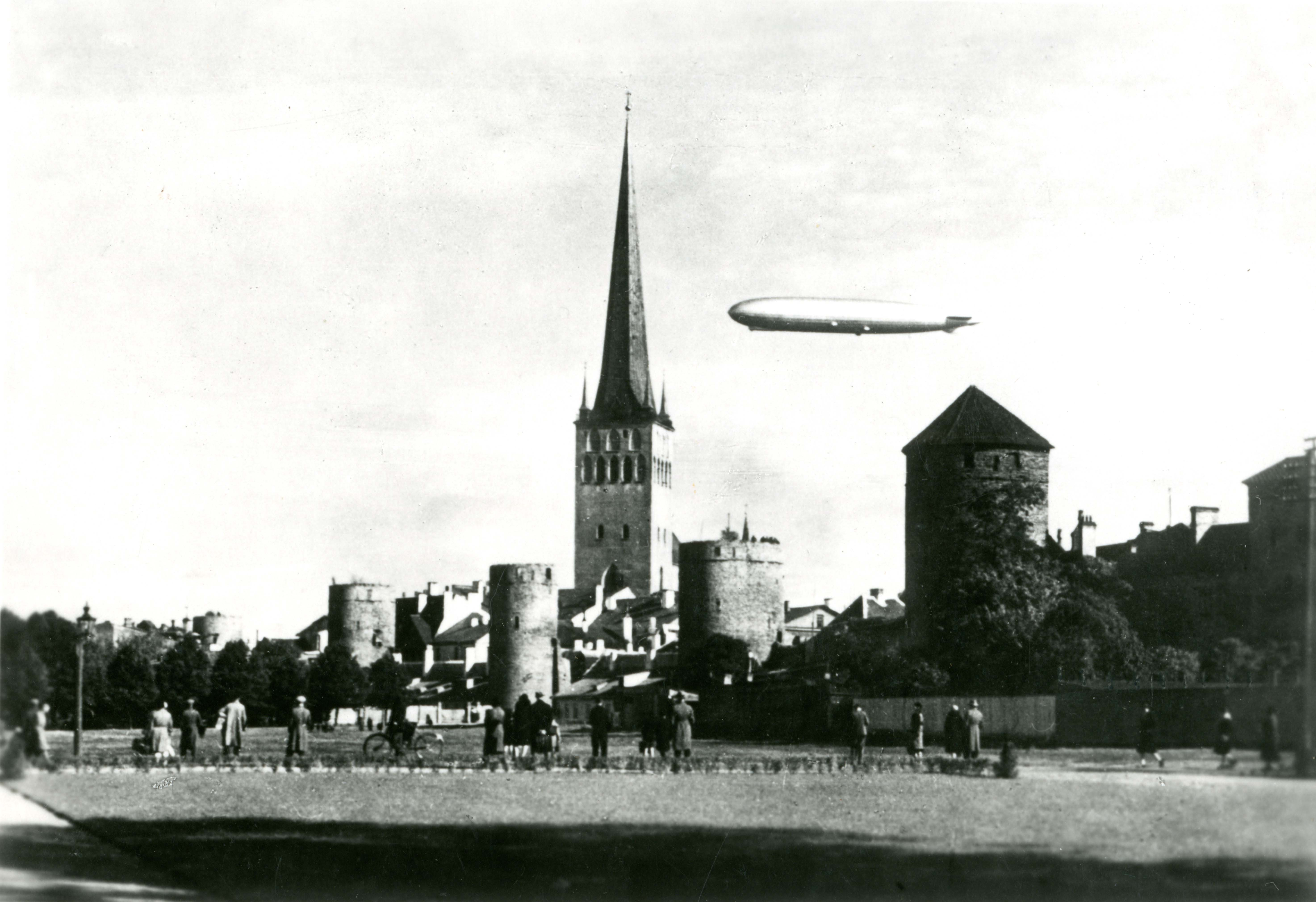 Zeppelin Tallinna kohal. Vaade Tornide väljakule